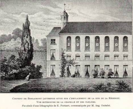 Pensionnat du Berlaimont à Bruxelles centre début 20ème siècle.